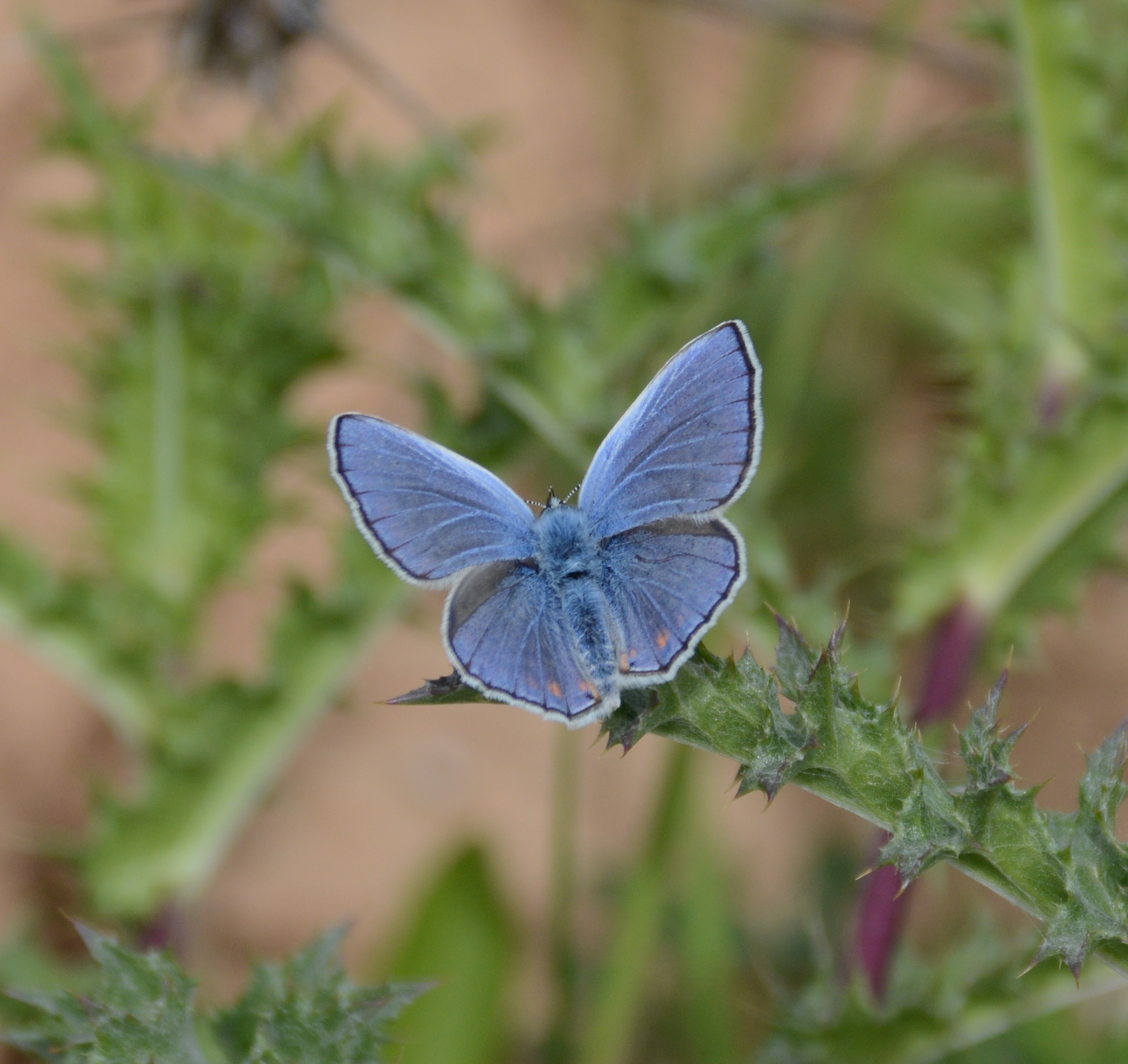 Plebejus pylaon cleopatra צולם בבקעת קריות ב-25.3.16 כחליל קליאופטרה